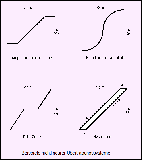 Darstellung von nichtlinearen Übertragungssystemen